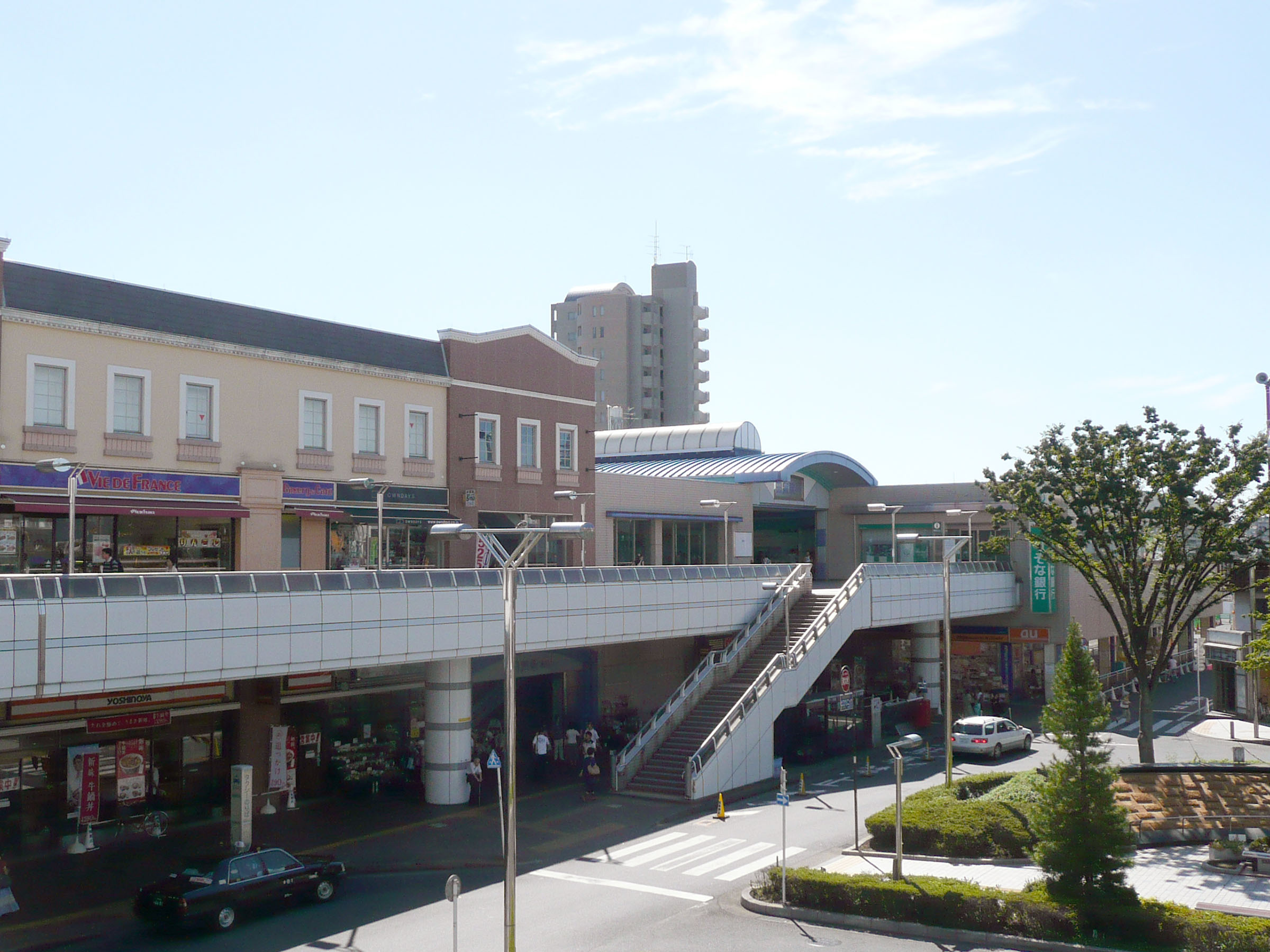 田無駅北口